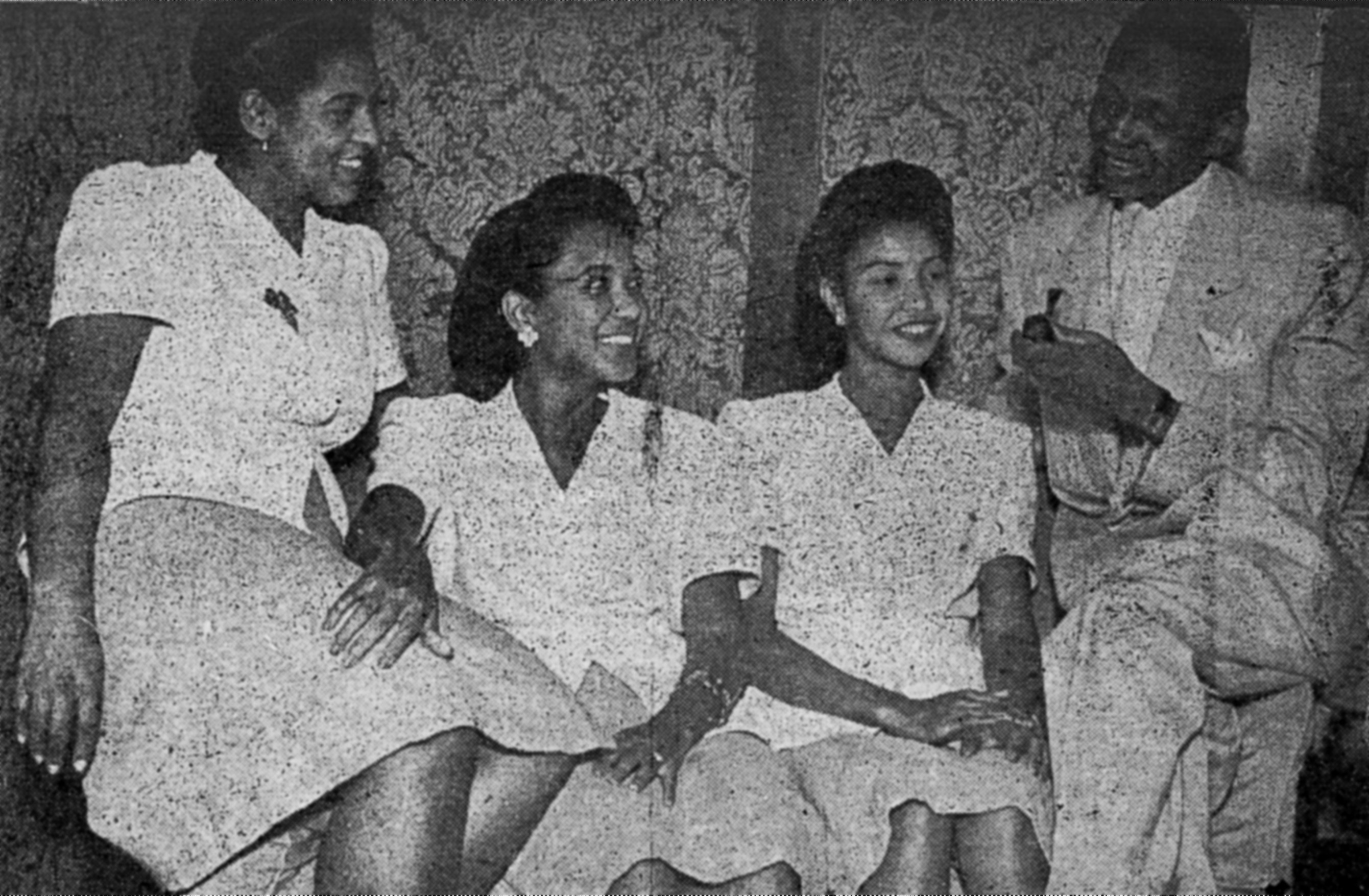 O cantor e compositor brasileiro, Ataulfo Alves (esquerda) e "as Suas Pastoras", em 1945.